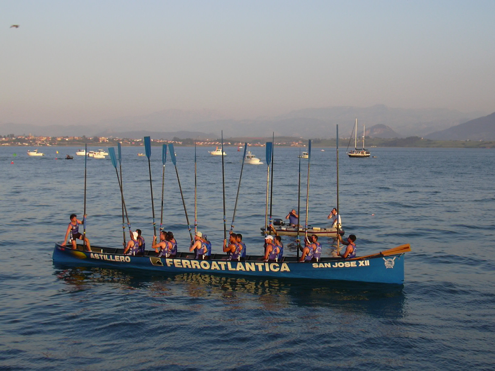 Ganador de la regata Bansander de 2003, Astillero.